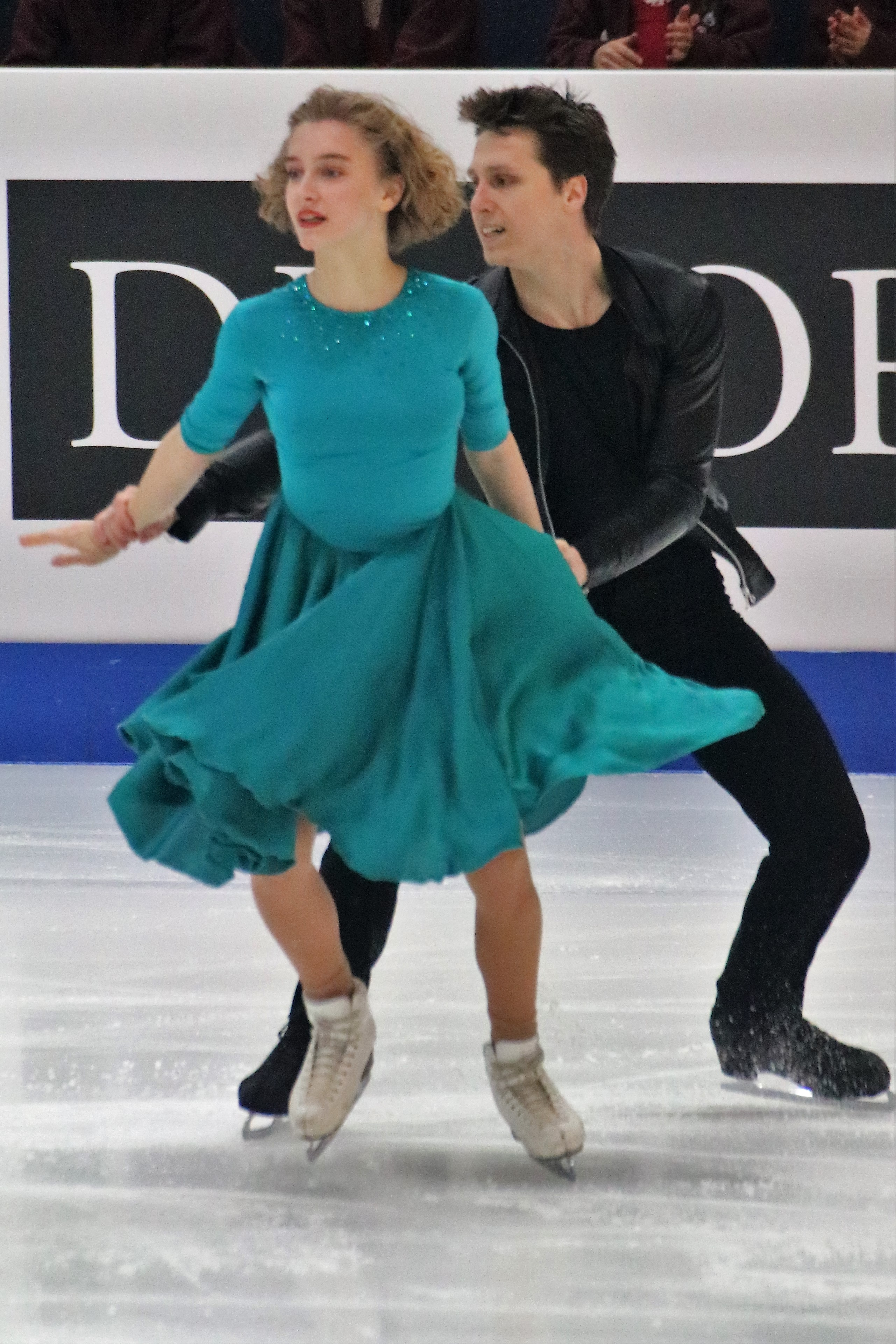 Эмилия Колеганова и Владислав Полховский (Беларусь) на чемпионате Европы по фигурному катанию 2020